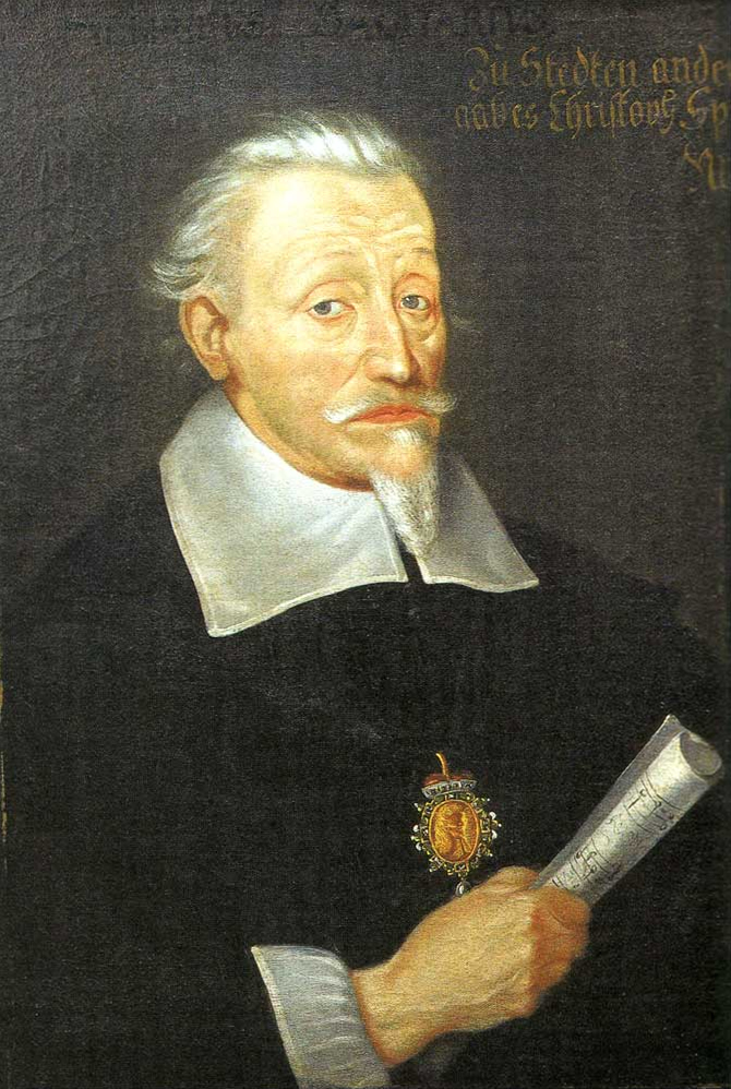 Depicted person: Heinrich Schütz